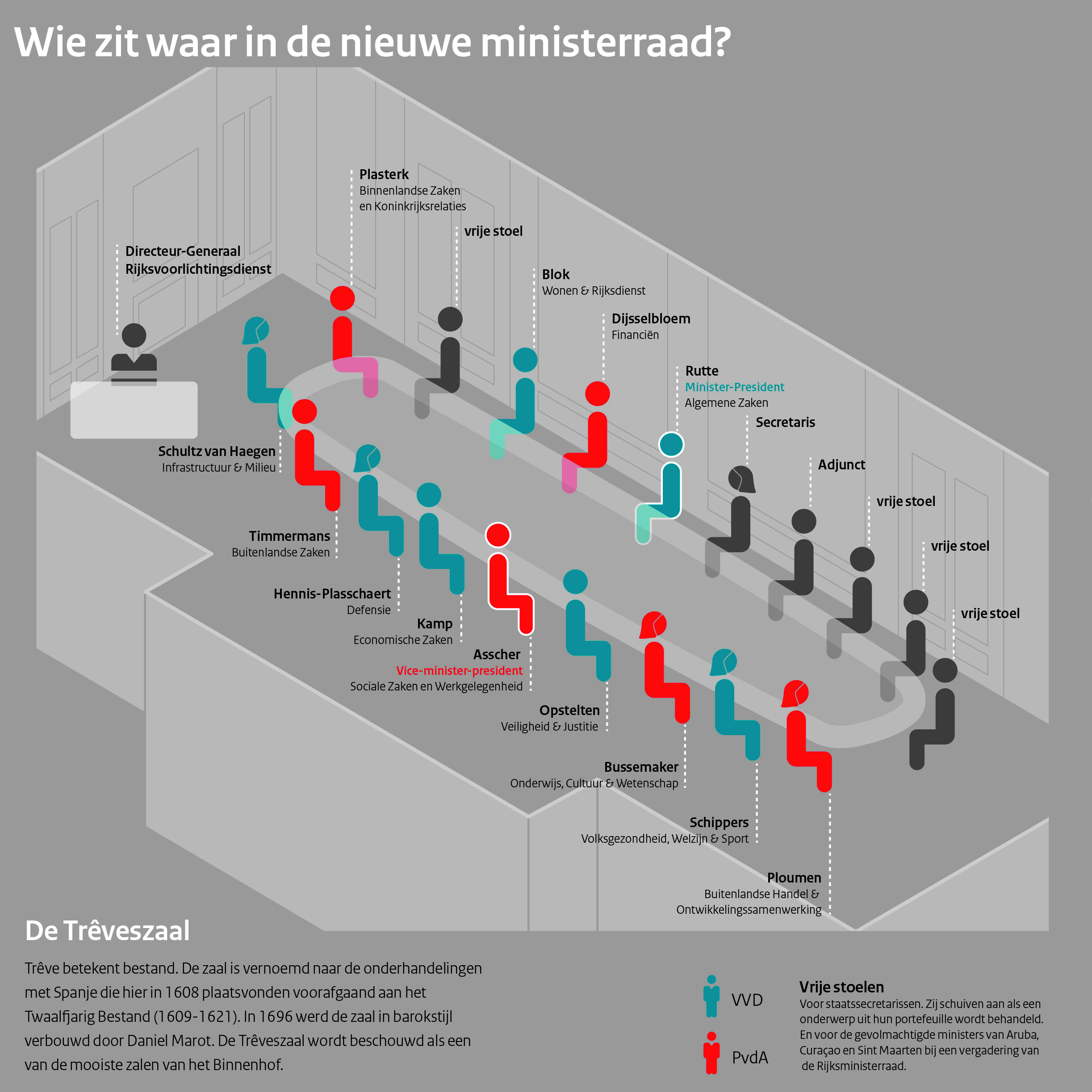 Bezetting in de Trêveszaal van de ministers in het kabinet-Rutte II